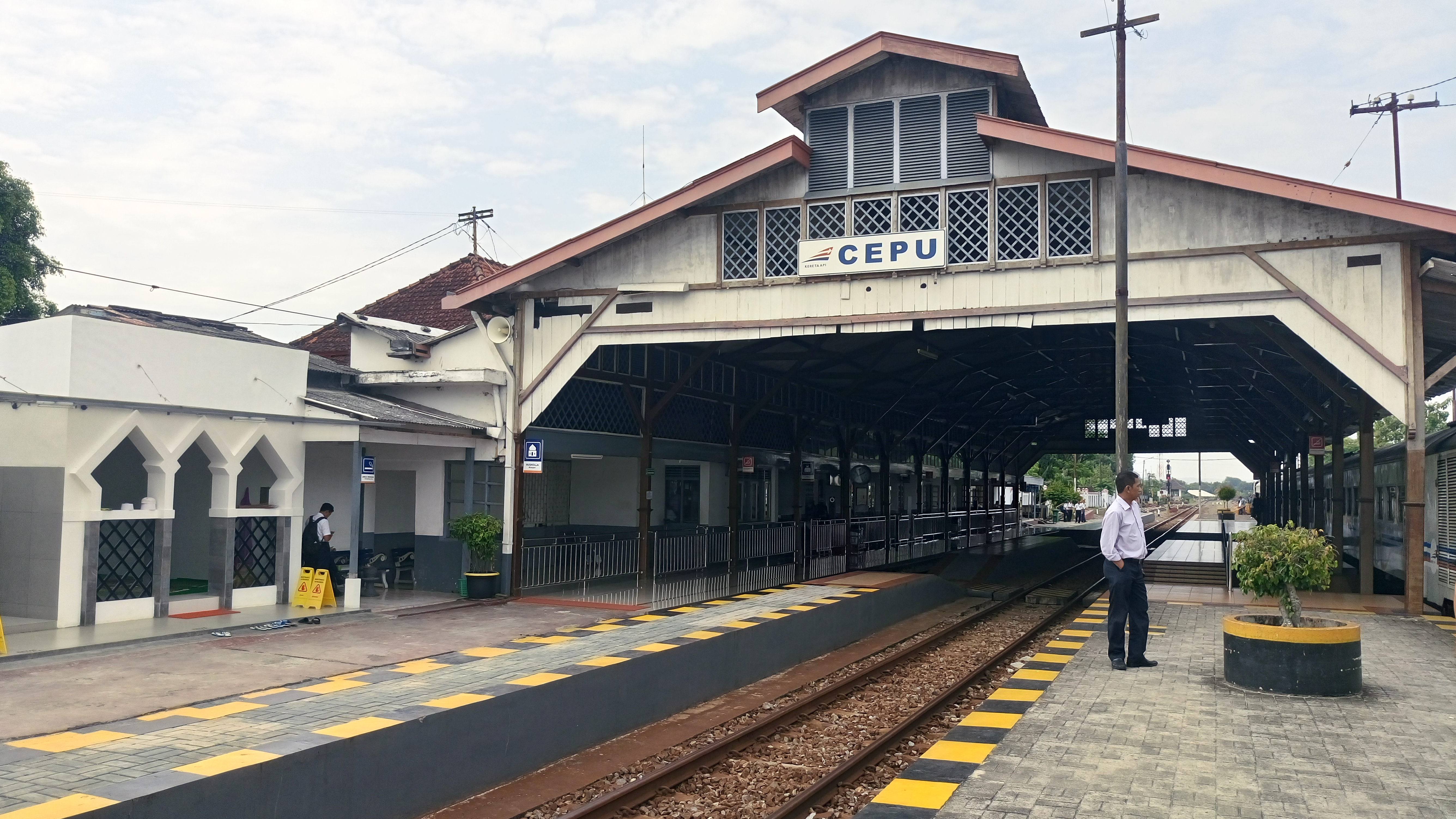 Peron dan palka Stasiun Cepu